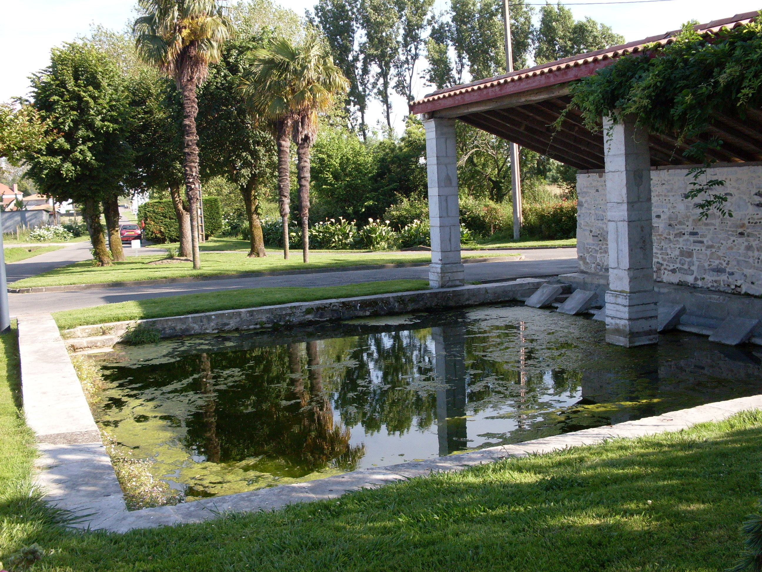 Le lavoir d'Orthevielle, Landes, France